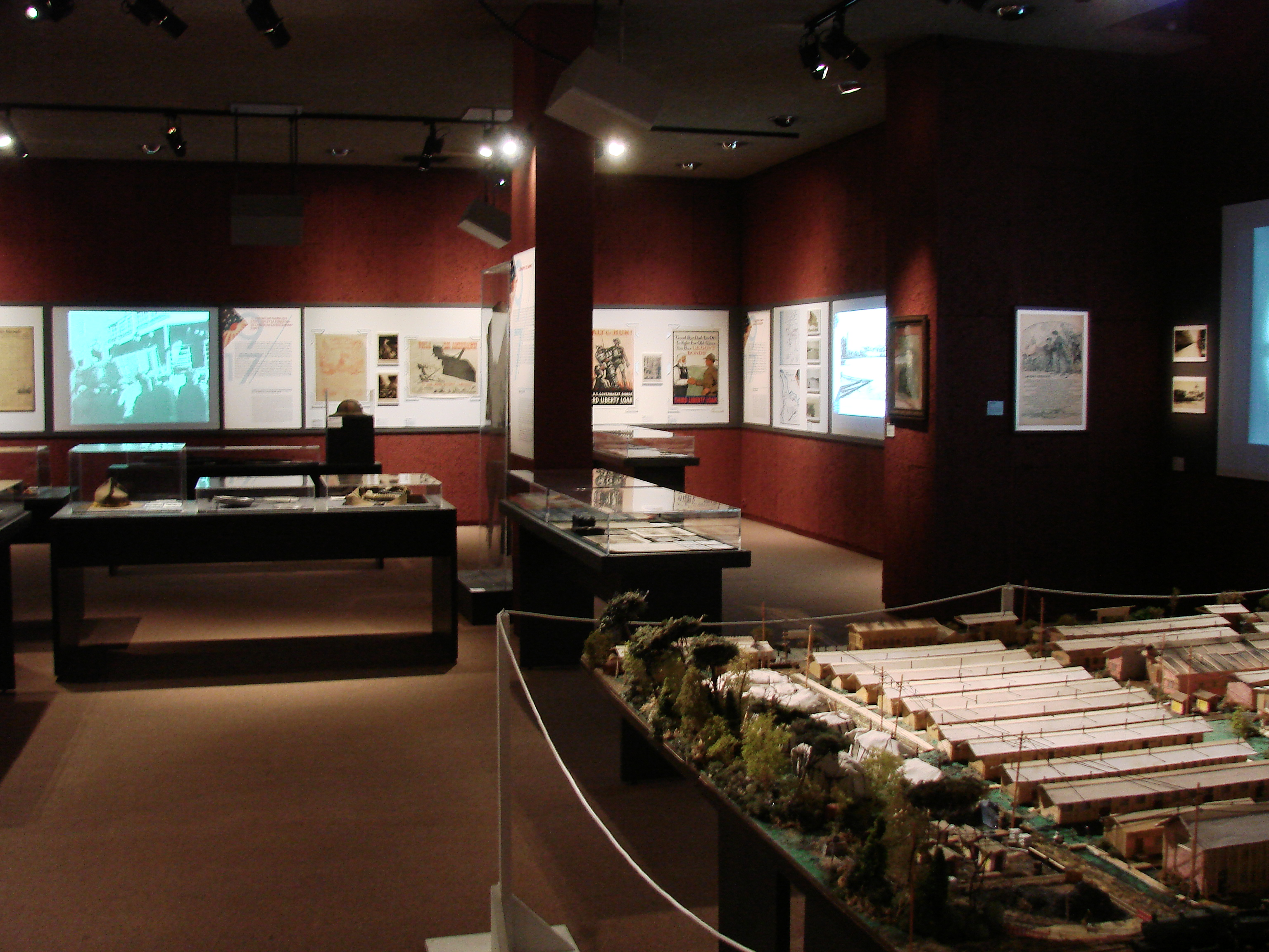 Vue de l'exposition temporaire 1917, voilà les Américains ! Au Centre Jean Moulin